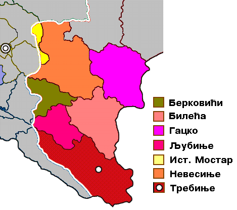 Источна Херцеговина